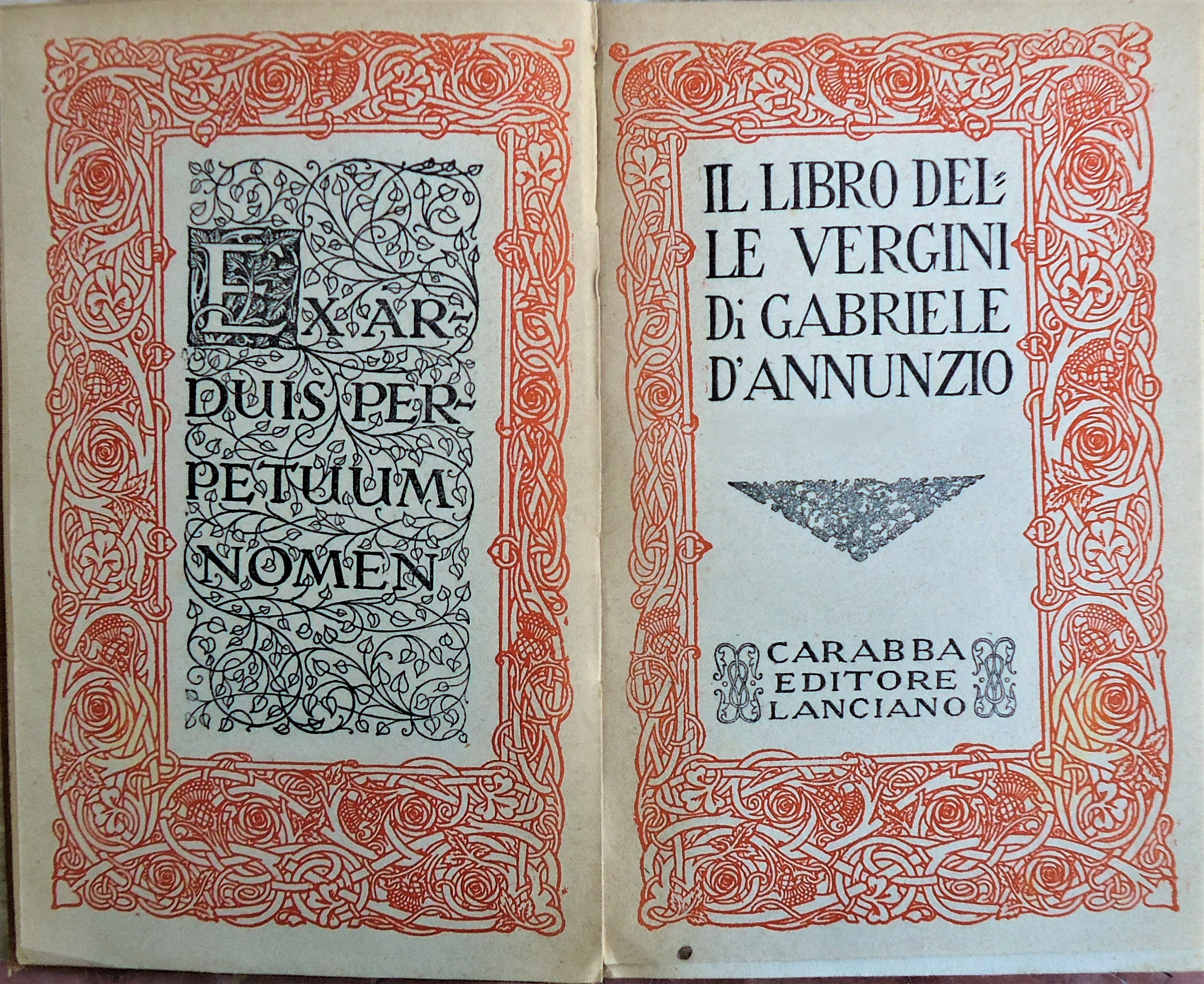 Collana Scrittori italiani e stranieri. (Collezione Fausta Samaritani-D'Annunzio)